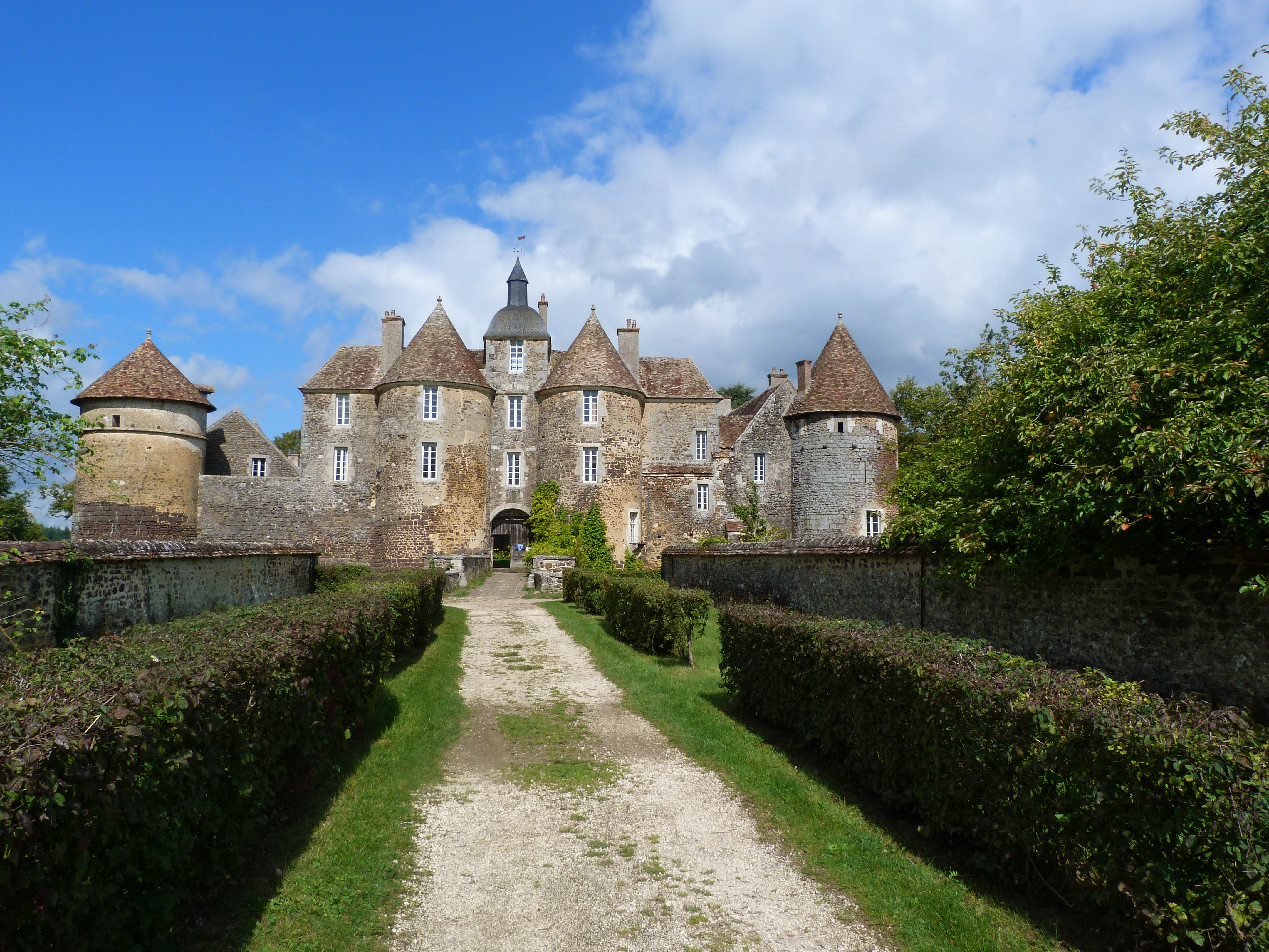 Kastelo de Ratilly